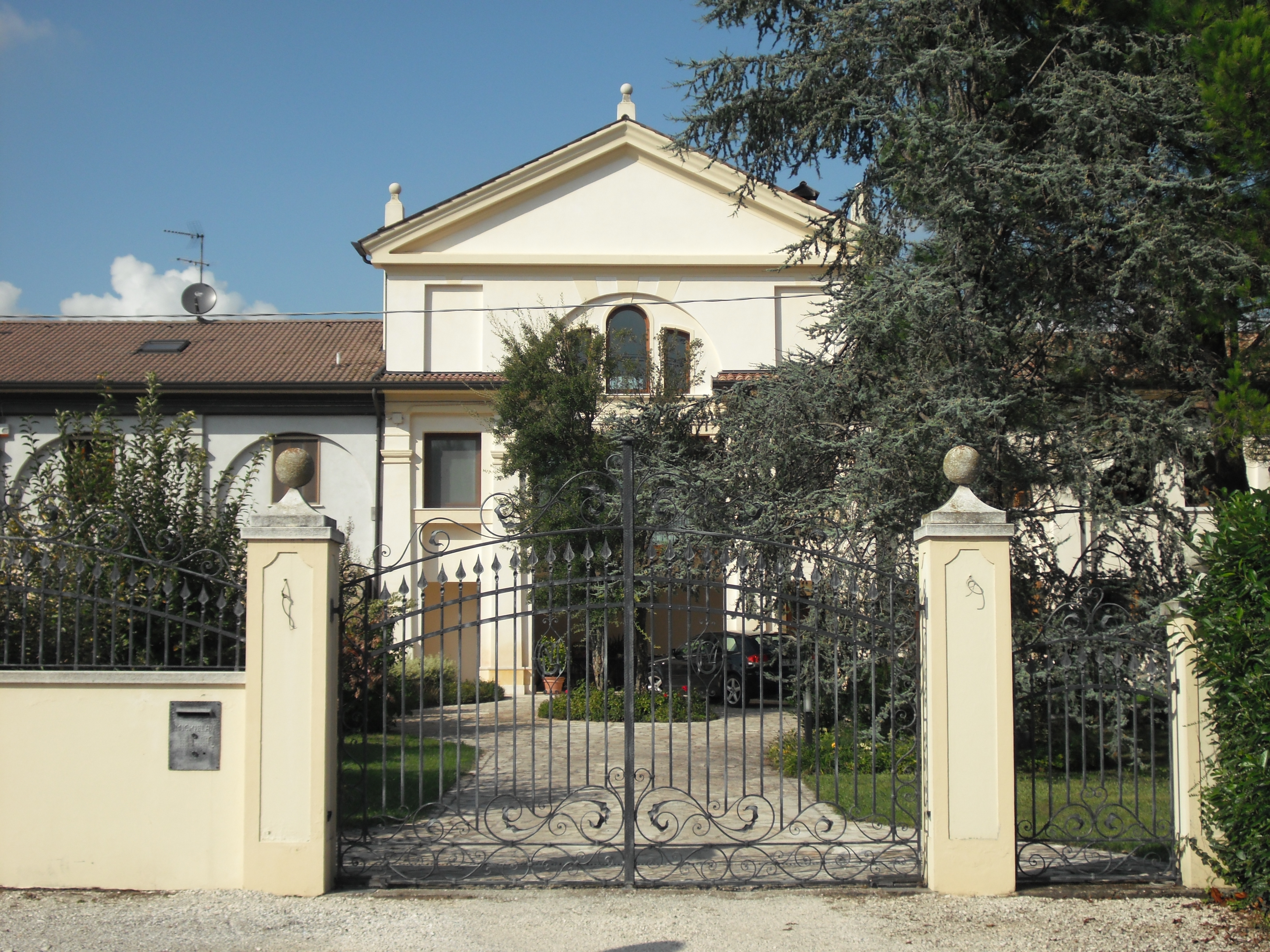 GFDL